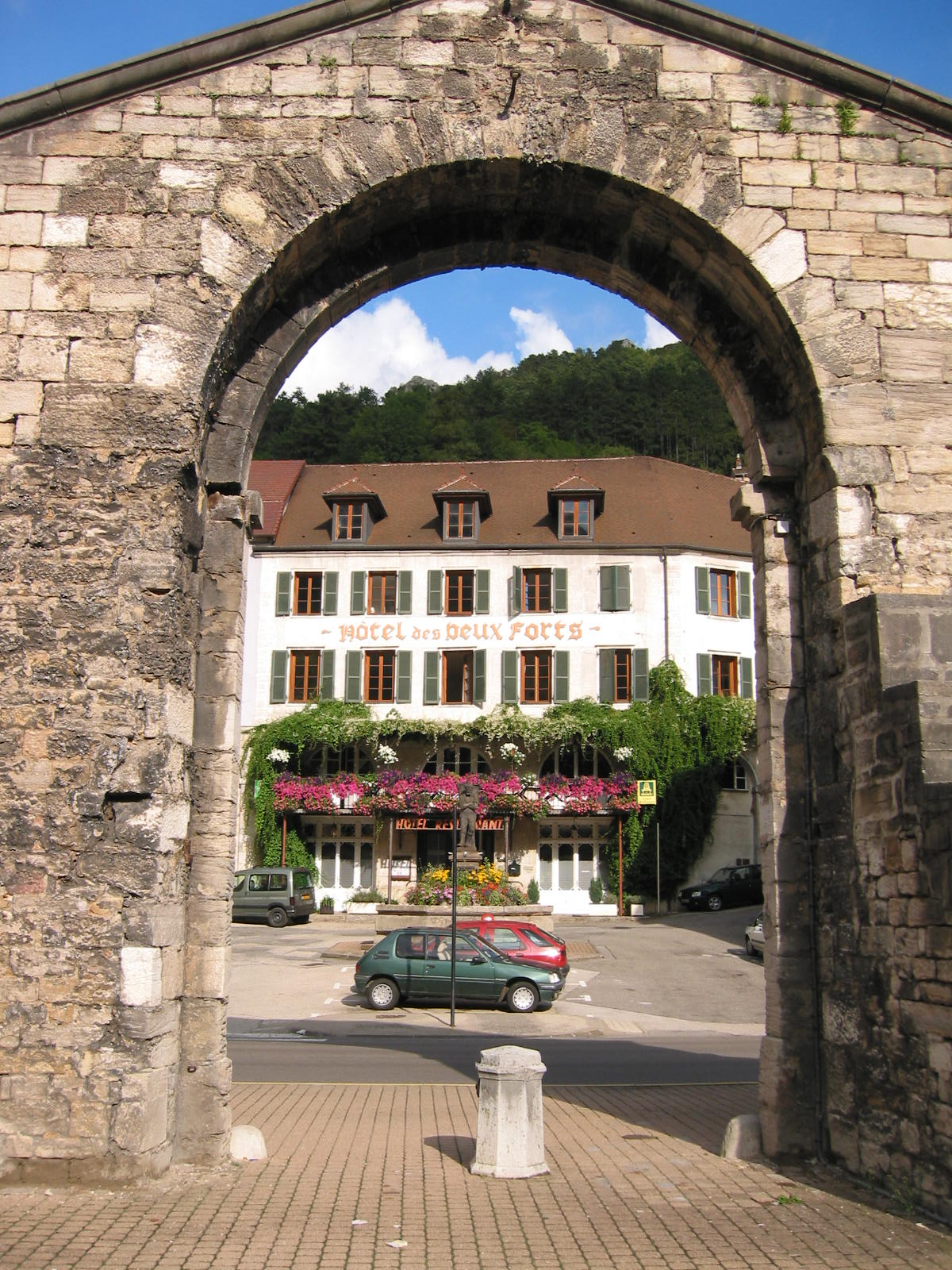 Salins-les-Bains (39)